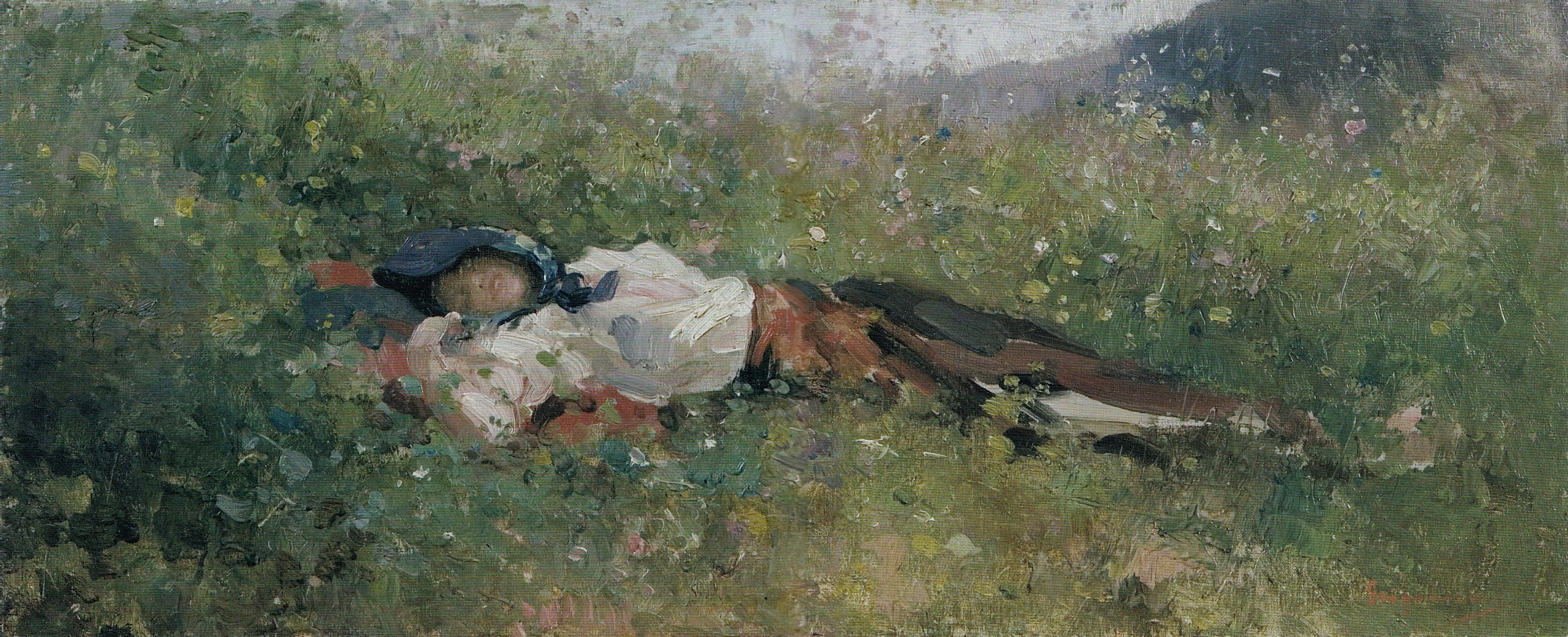 Țărancă culcată în iarbă - la Galeria de Artă Contemporană a Muzeului Național de Artă al României